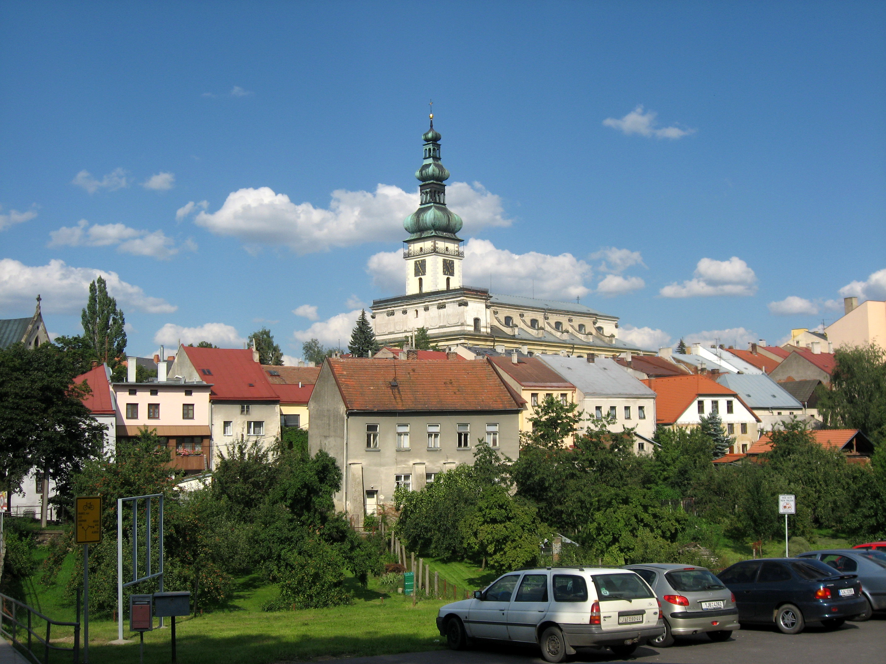 Polná, pohled na děkanský kostel Nanebevzetí Panny Marie